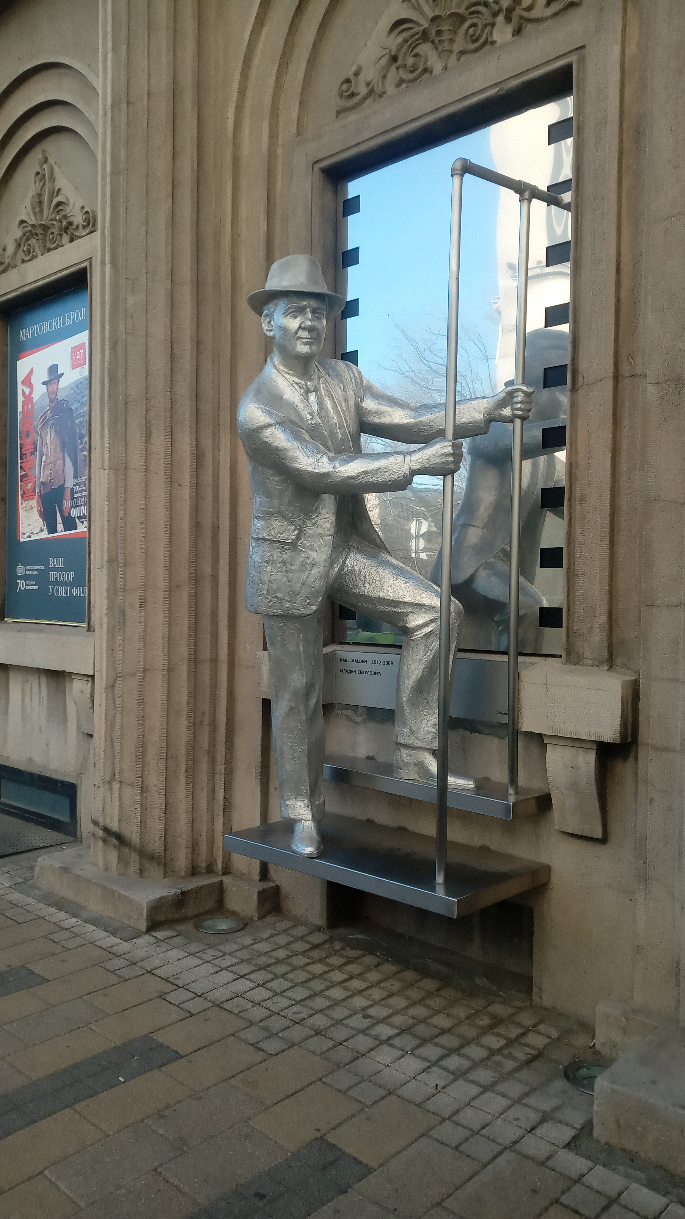 Srpski (latinica): Karl Malden